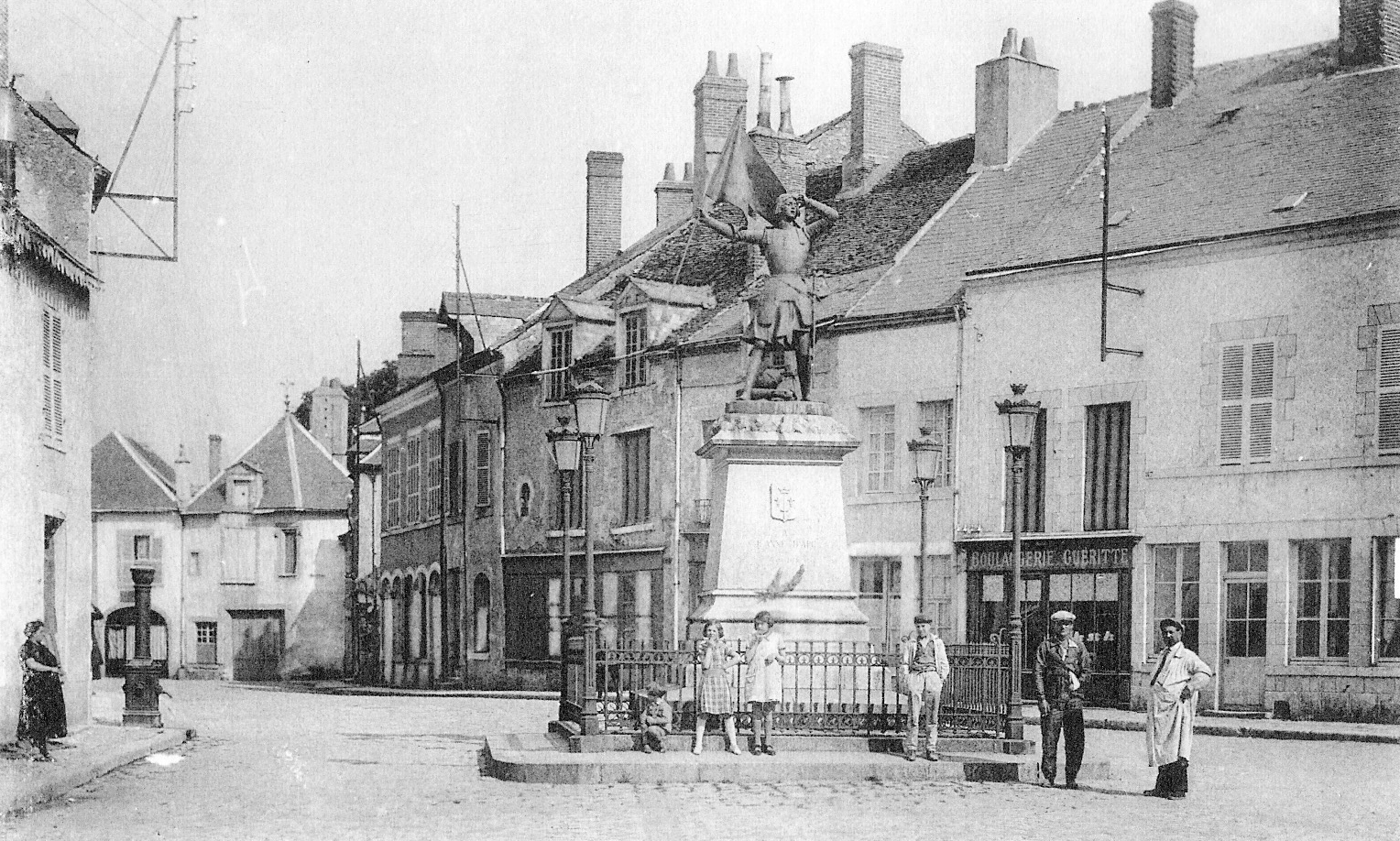 Alfred-Désiré Lanson (Français, 1851-1898): Jeanne d'Arc blessée à la bataille de Jargeau, bronze, 1895, mise en place en 1898, signée sur la plinthe Lanson 1895 et Leblanc Barbedienne/Fondeur Paris/offert par Mme Georges Dupuis, inscription sur le devant du piédestal A Jeanne d'Arc/12 juin 1429/1898. Carte postale illustrant la statue en pied en armure portant un étendard élevée sur la Place du Martroi, Jargeau, Loiret, France. [1]